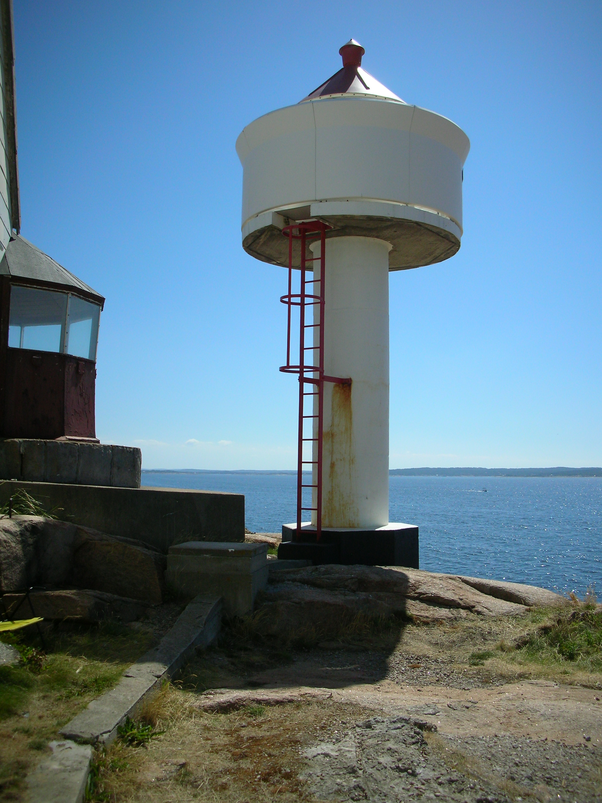 Strømtangen fyr ligger på en øy i onsøy, like utenfor Fredrikstad.